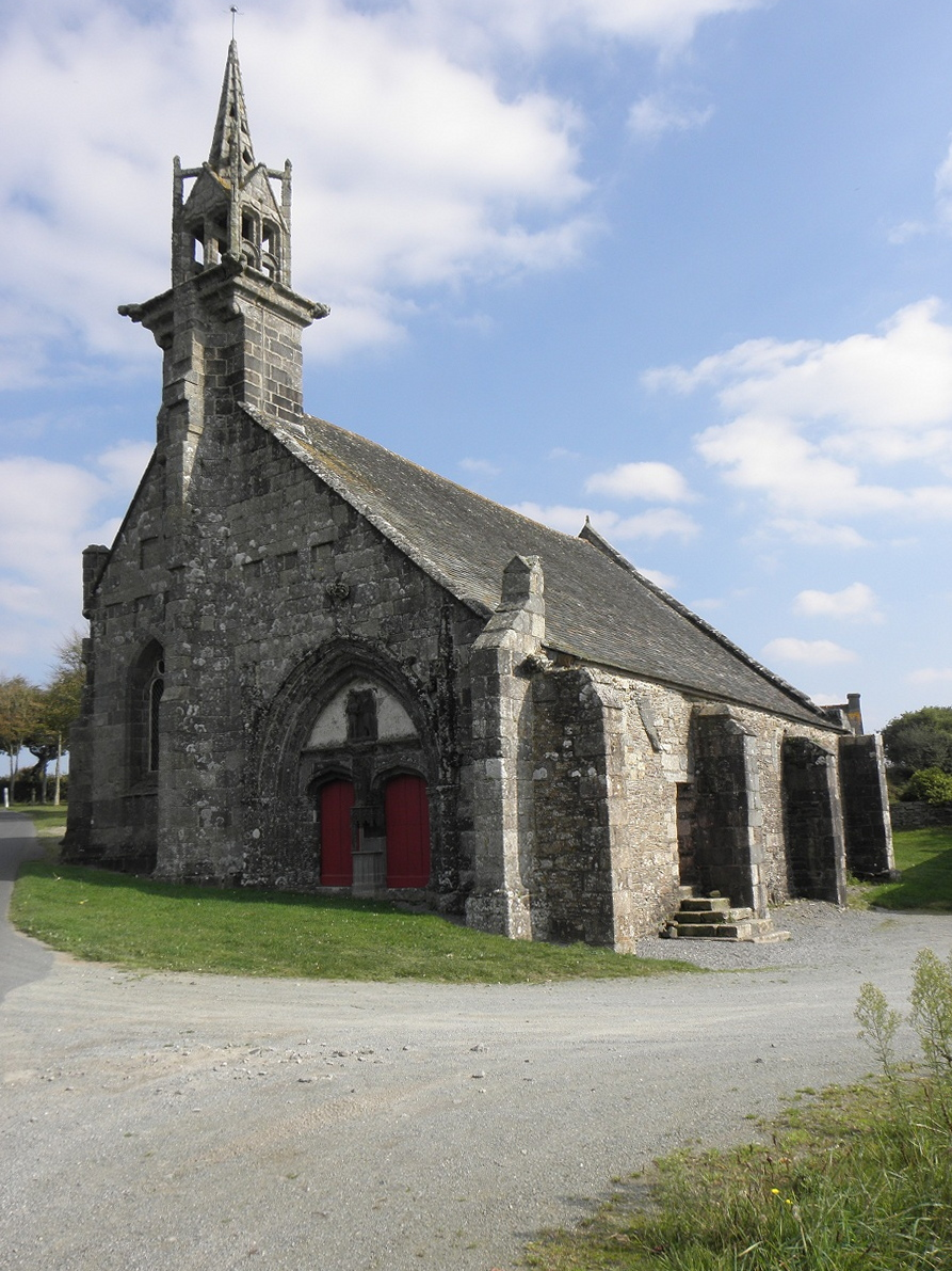 Façade occidentale de la chapelle Saint-Jean-Balanant en Plouvien (29).